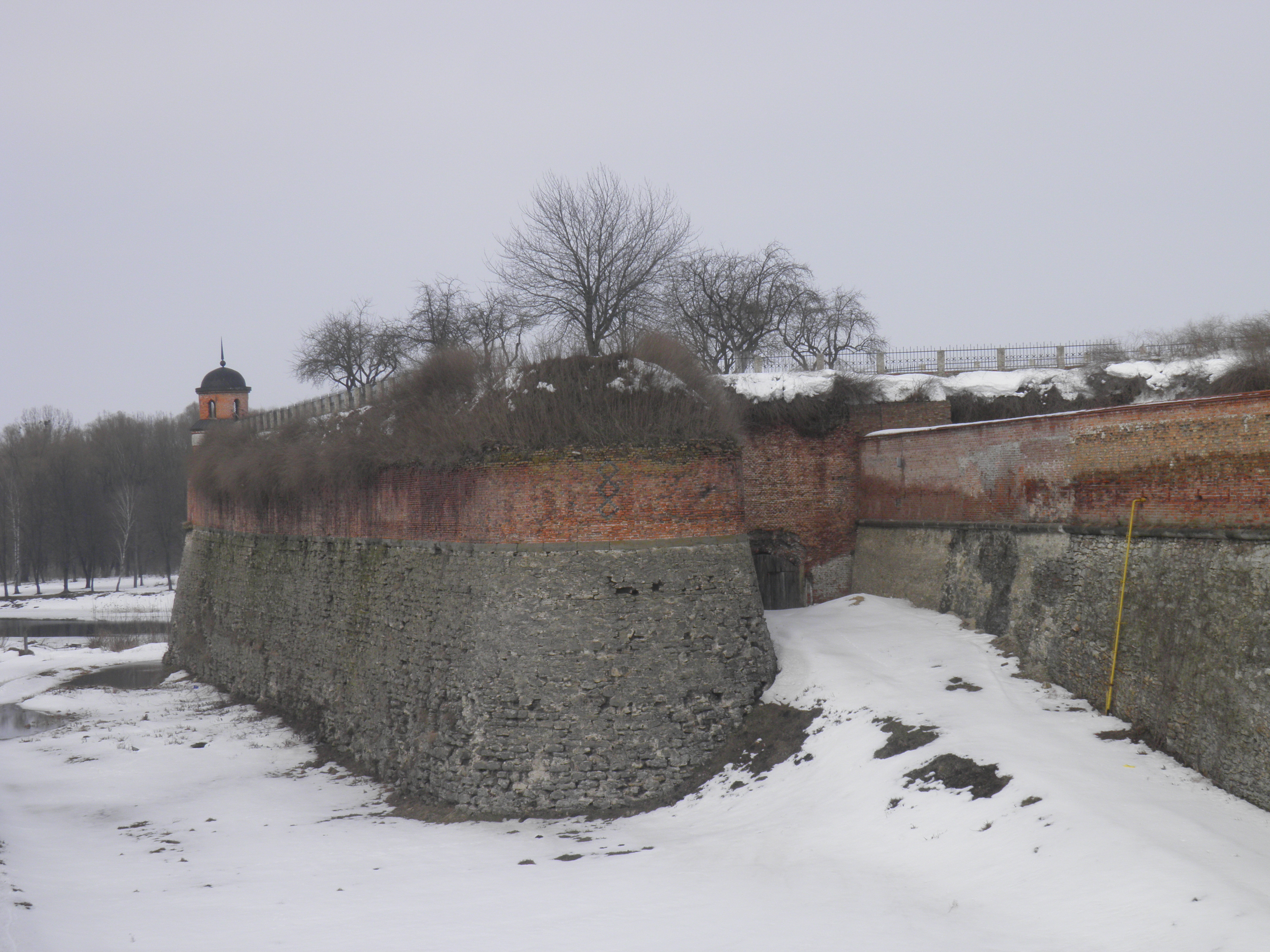 Замок князiв Острозьких-Любомирських (мур.), Дубно, вул.Шевченка